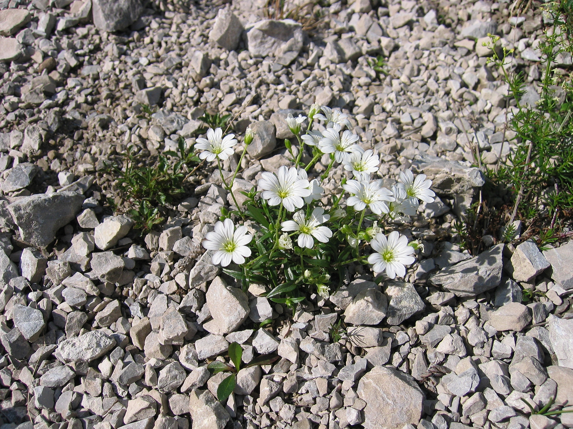 Cerastium carinthiacum subsp. carinthiacum Hinterstoder / Upper Austria, Austria